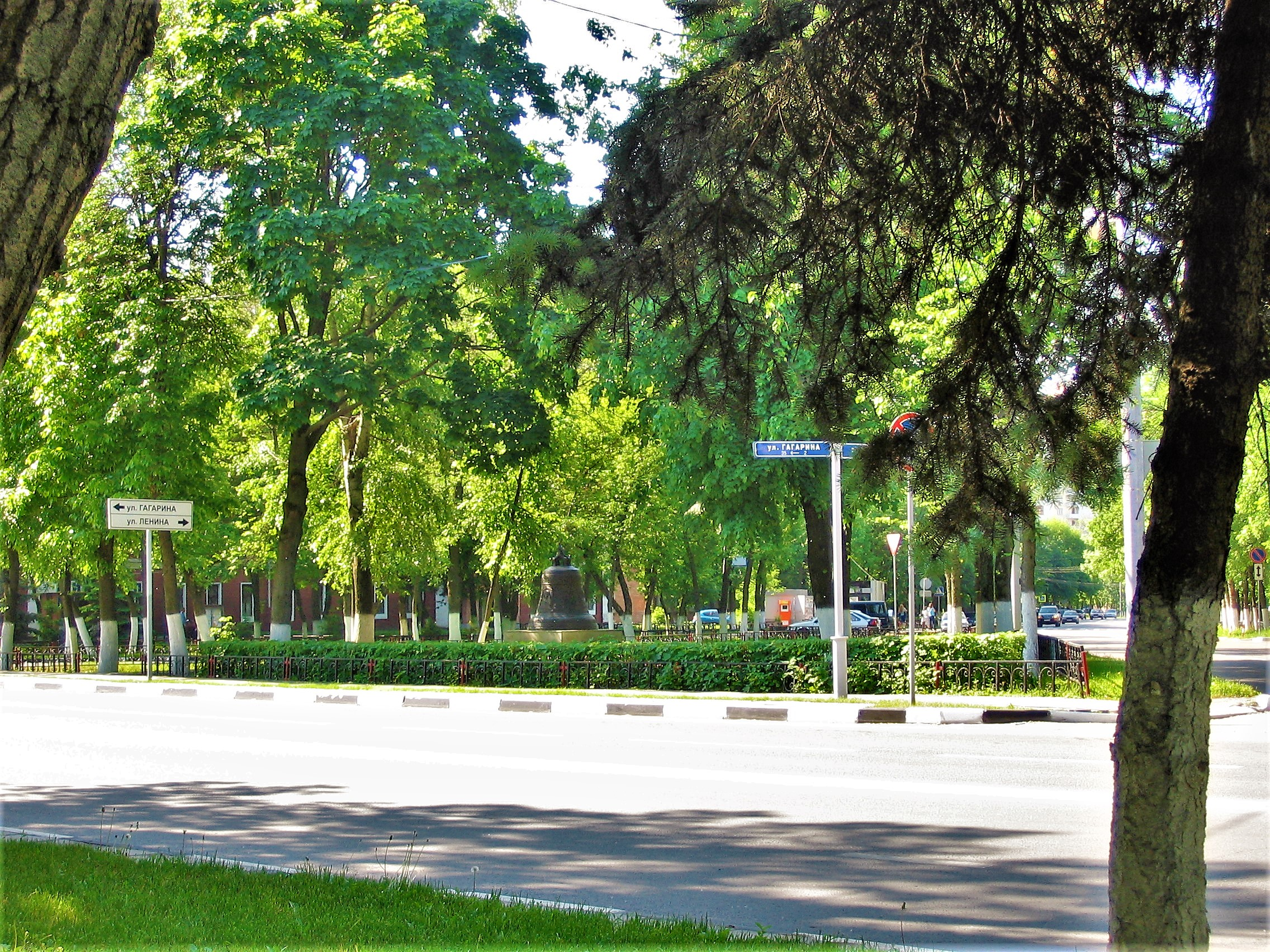 Площадь на пересечении улиц Ленина, Победы и Гагарина в Реутове.